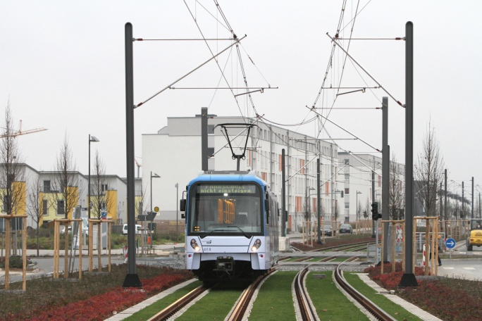 Bauarbeiten auf der Bahnstrecke in Frankfurt Riedberg